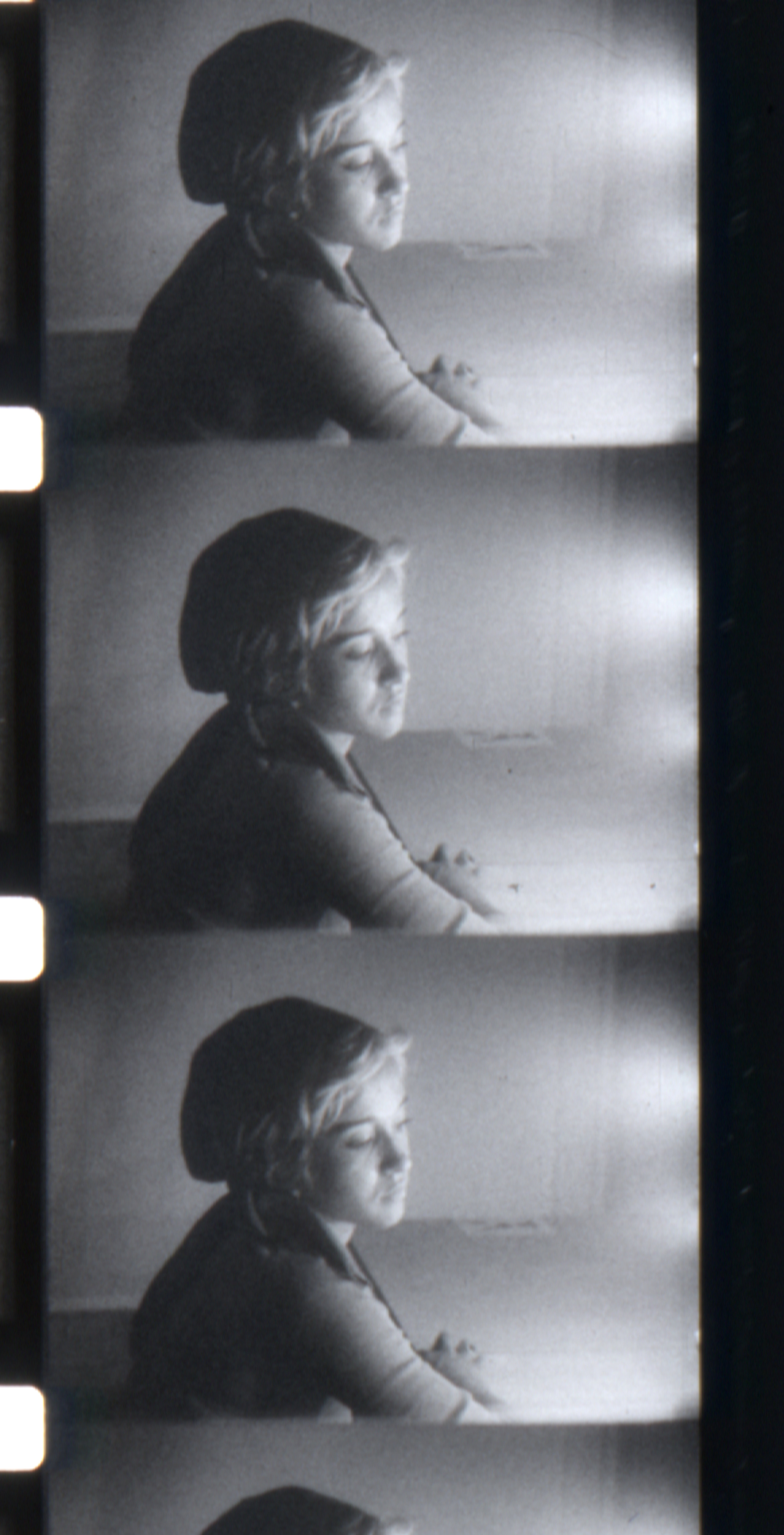 Photogrames extraits du film original en 16mm.